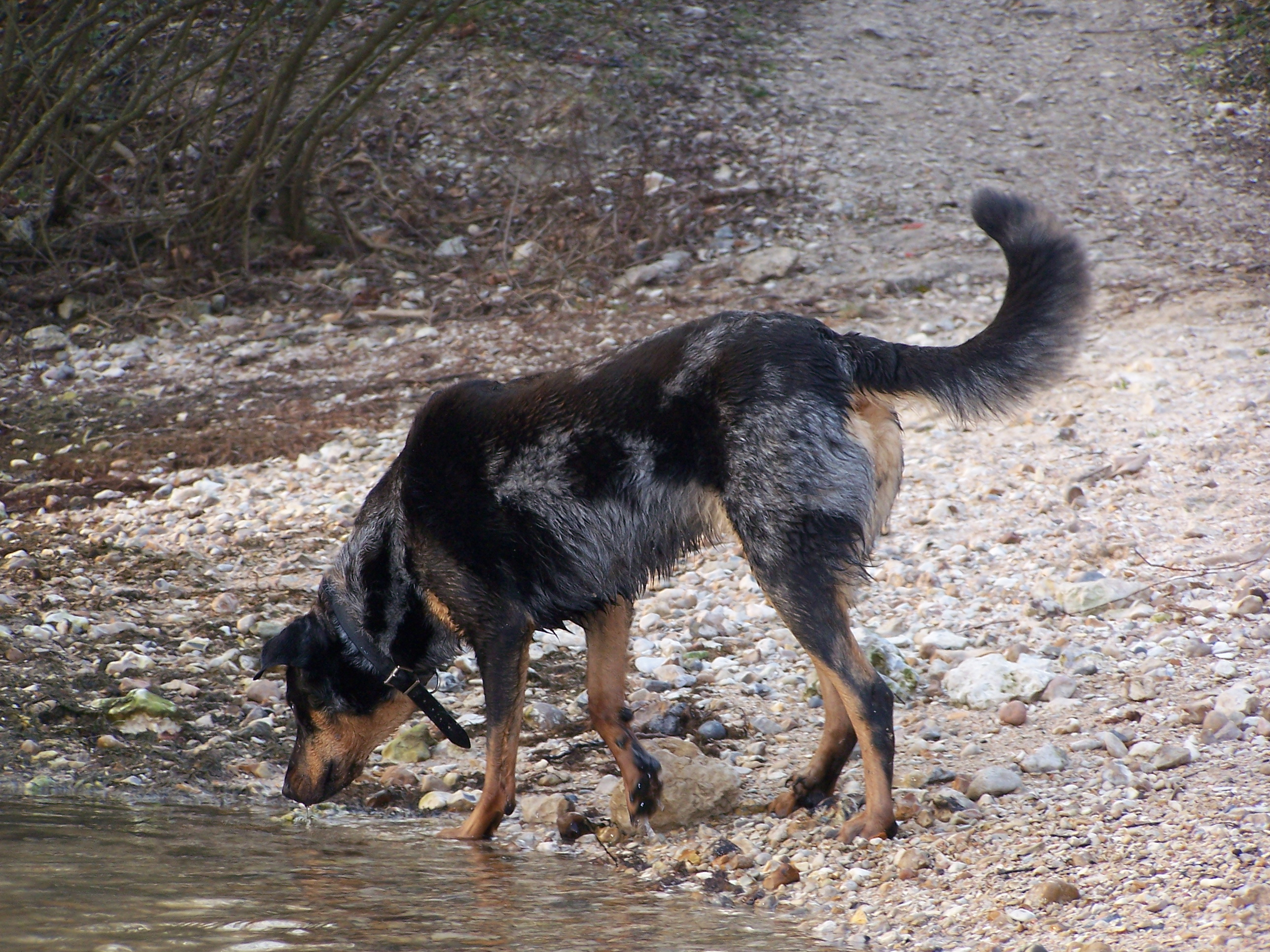 Beauceron arlequin